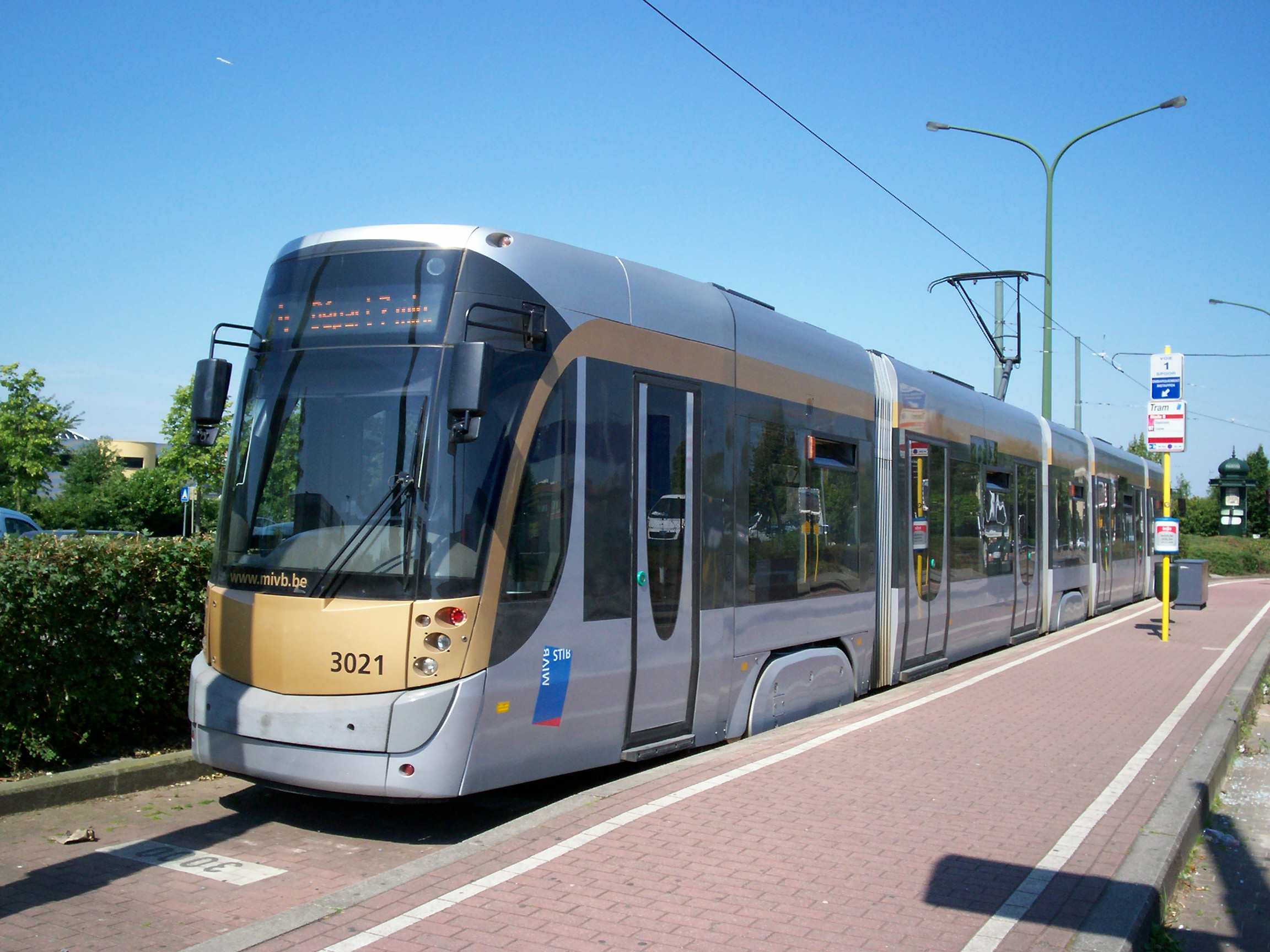 Tramway bruxellois ligne 4 à "Stalle P", station terminus.